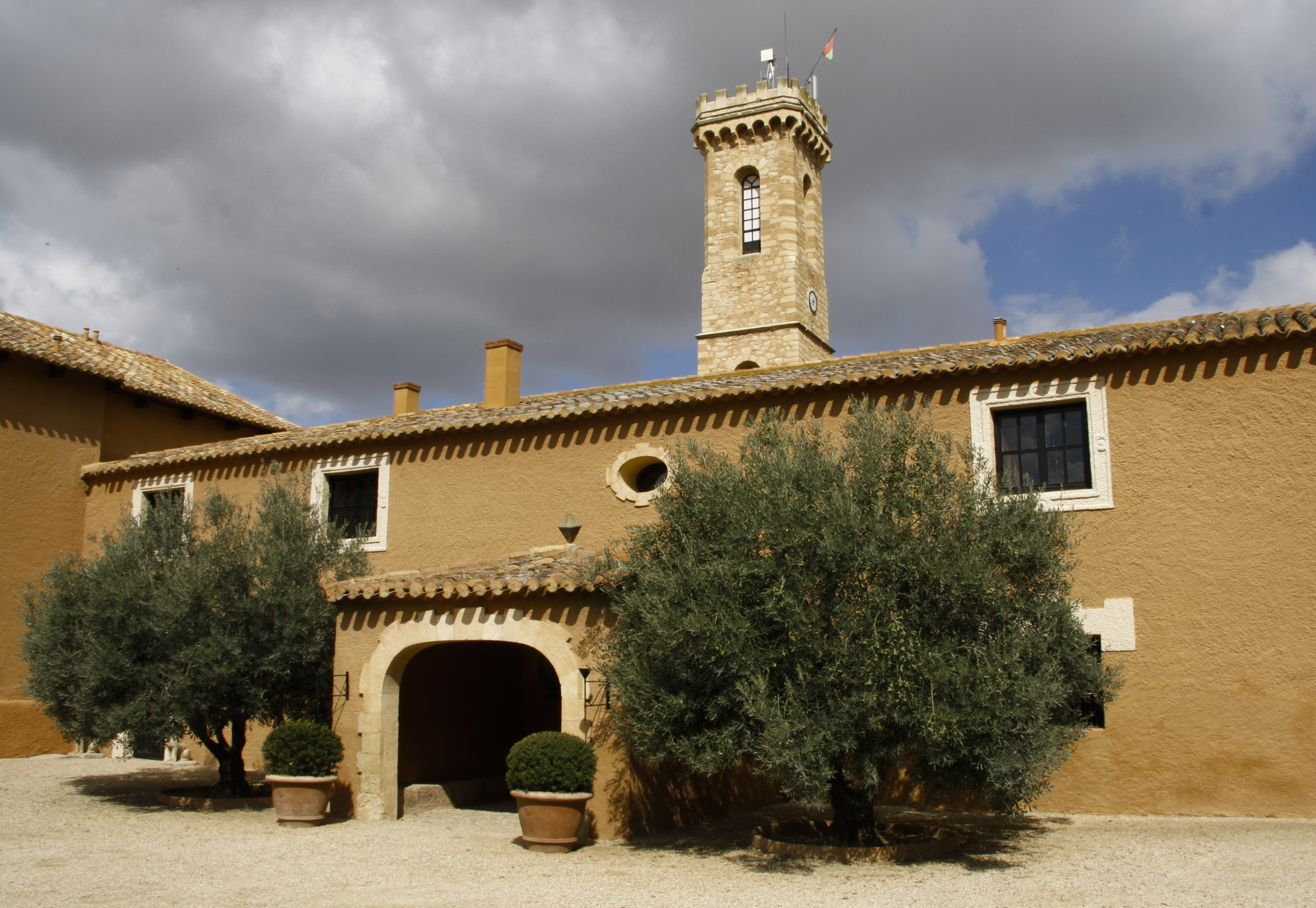 Entrada a Dehesa de Los Llanos en Albacete